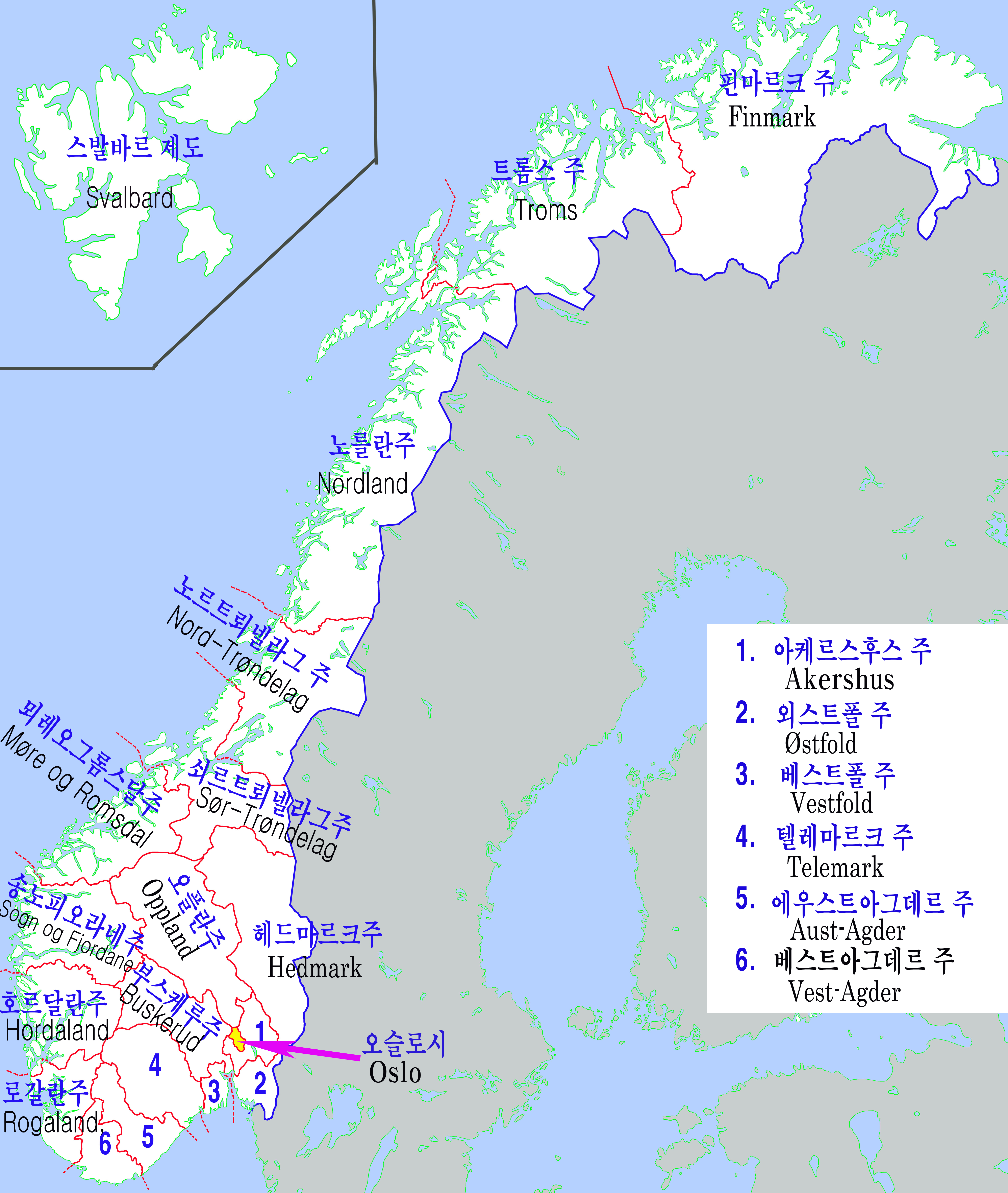 노르웨이 행정구역